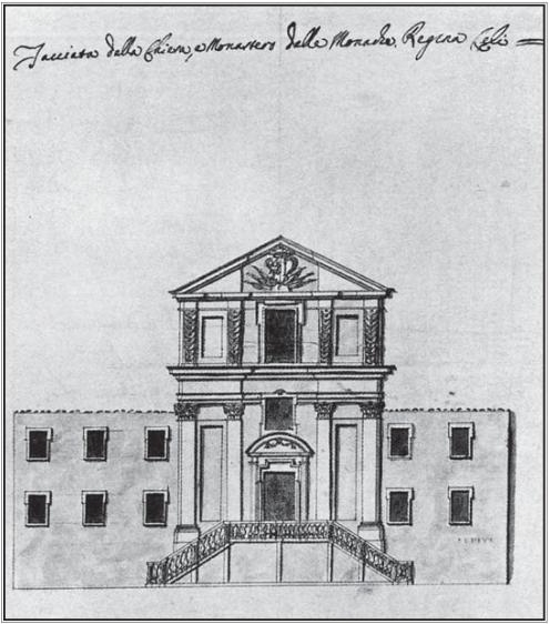 Pietro Paolo Coccetti – ”Facciata della Chiesa, e Monastero delle Monache Regina Coeli”